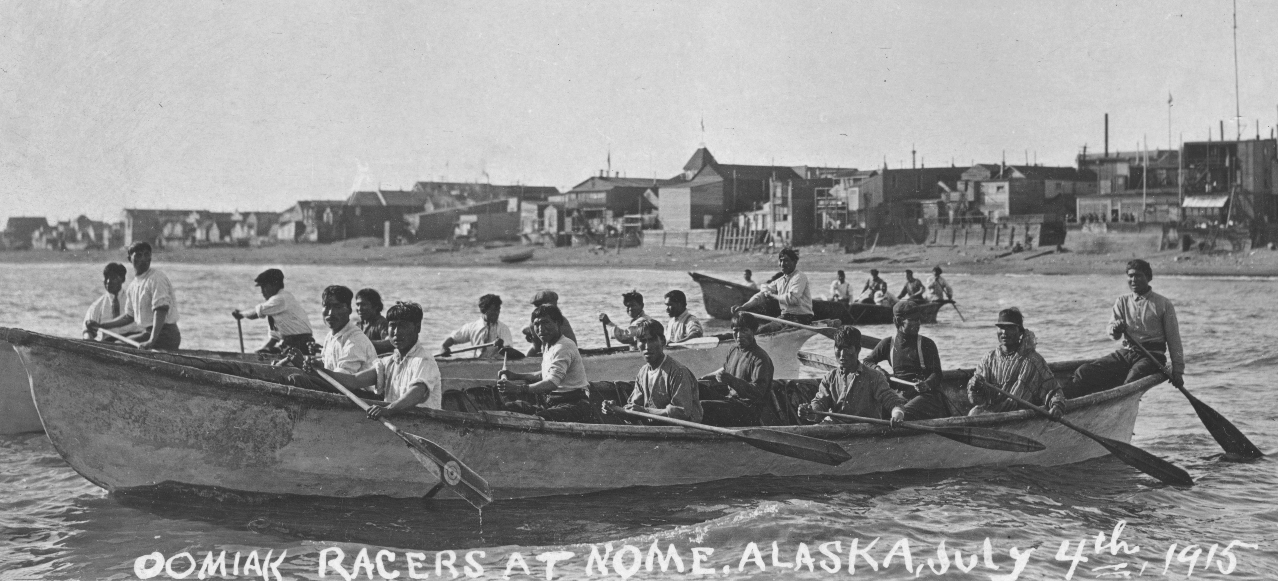 Inupiats race in umiaks. Nome, Alaska.